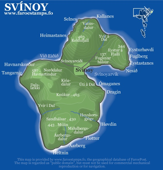 Die Insel Svínoy der Färöer